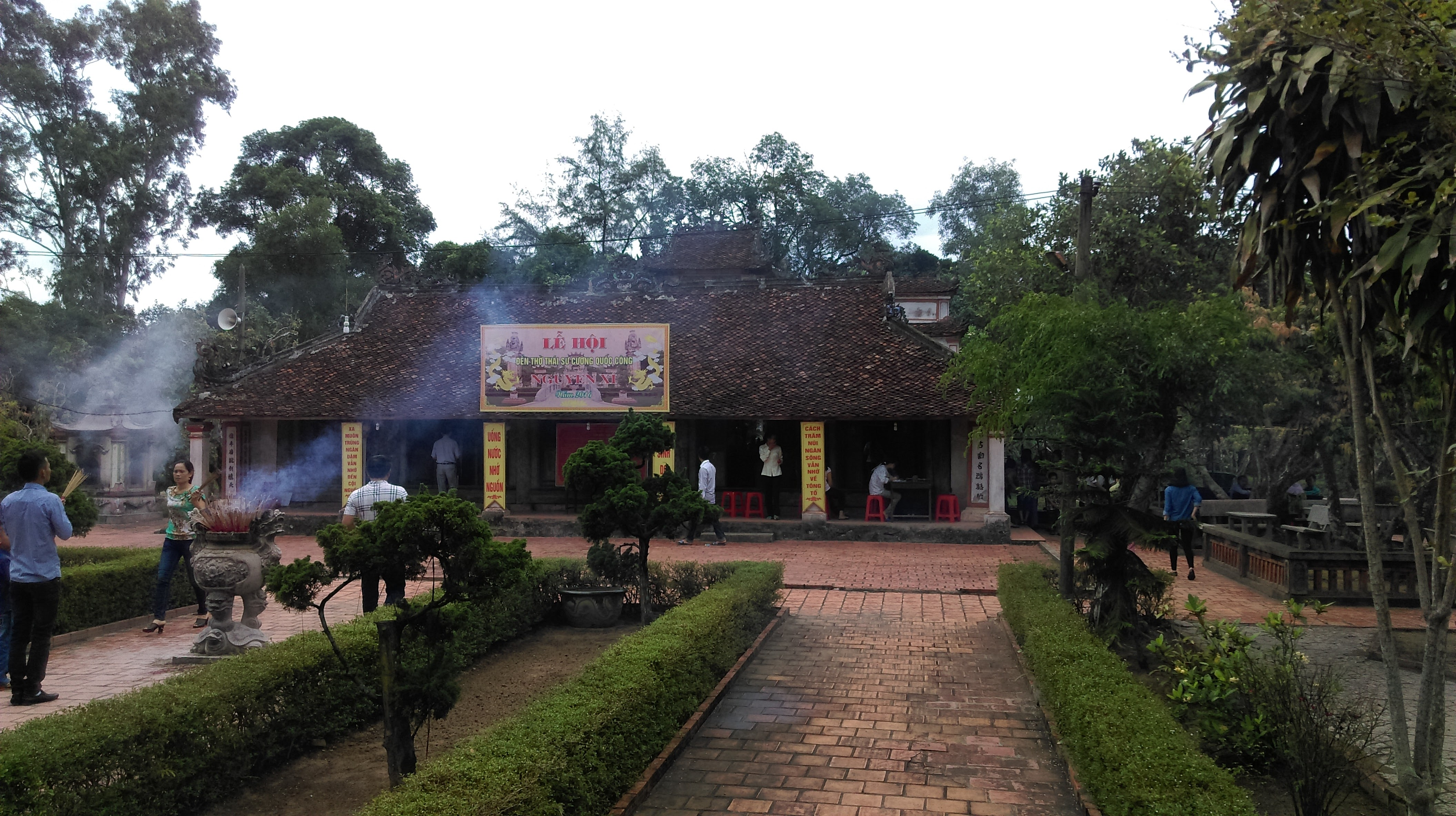 Đền thờ Nguyễn Xí, Nghi Hợp, Nghi Lộc, Nghệ An 5